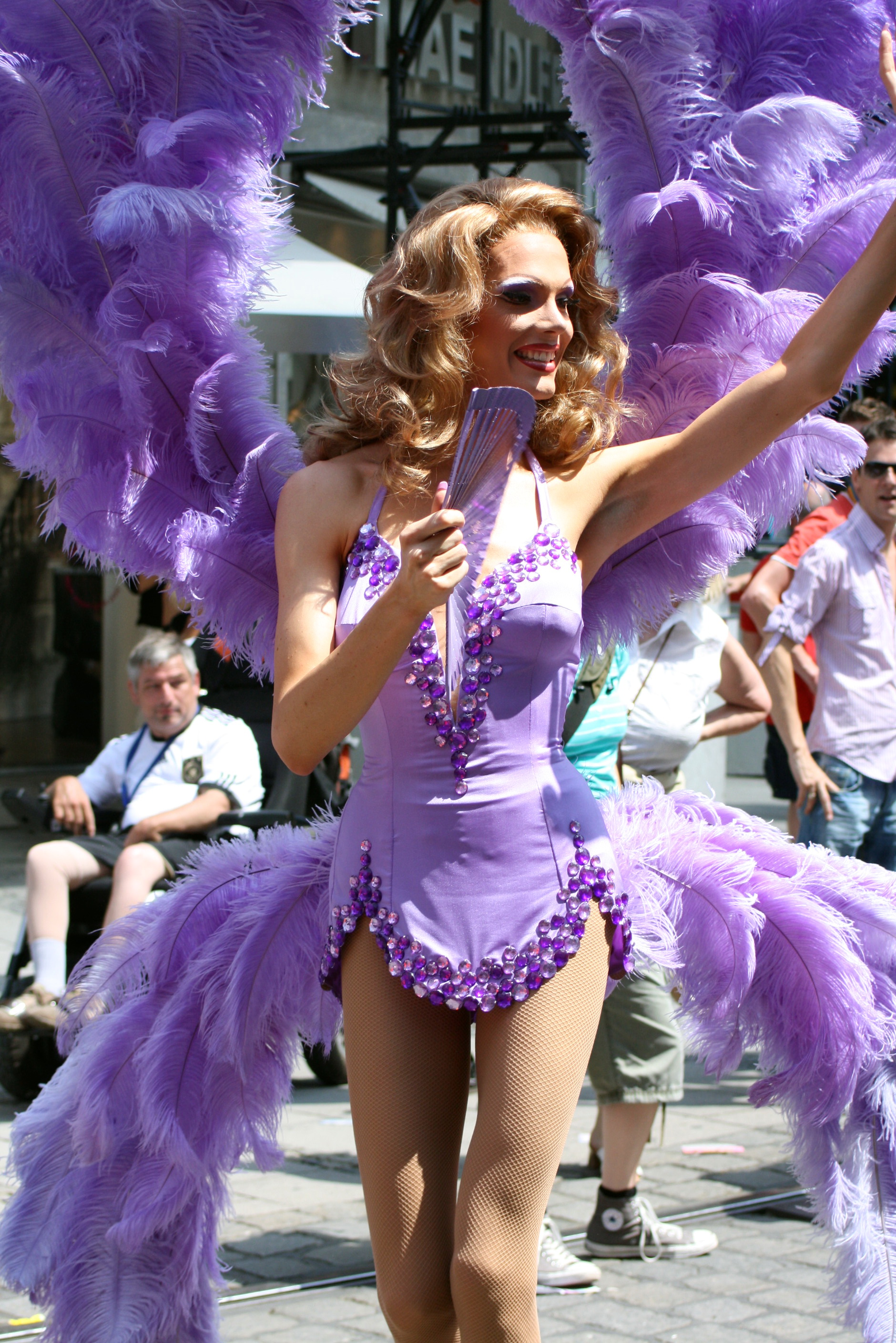 Lila Drag Queen auf dem CSD 2011 in München